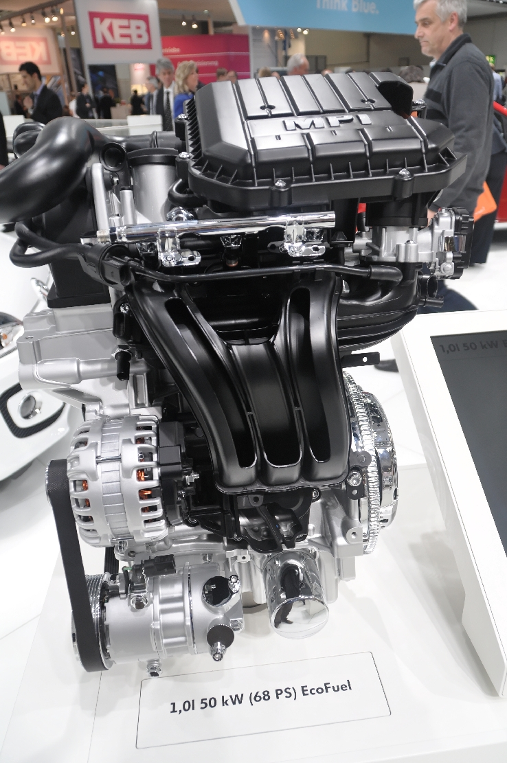 Hannover-Messe April 2012 Dieses Foto entstand durch die Mithilfe des gemeinnützigen Vereins Skillshare bei der Akkreditierung als Fotograf. Infos unter skillshare.eu Skillshare e.V. ist ein eingetragener gemeinnütziger Verein zur Förderung der Bildung durch Unterstützung der Erstellung, Sammlung und Verbreitung so genannten freien Wissens. IBAN: DE16 8306 5408 0004 8850 66 BIC: GENODEF1SLR Bank: VR-Bank Altenburger Land